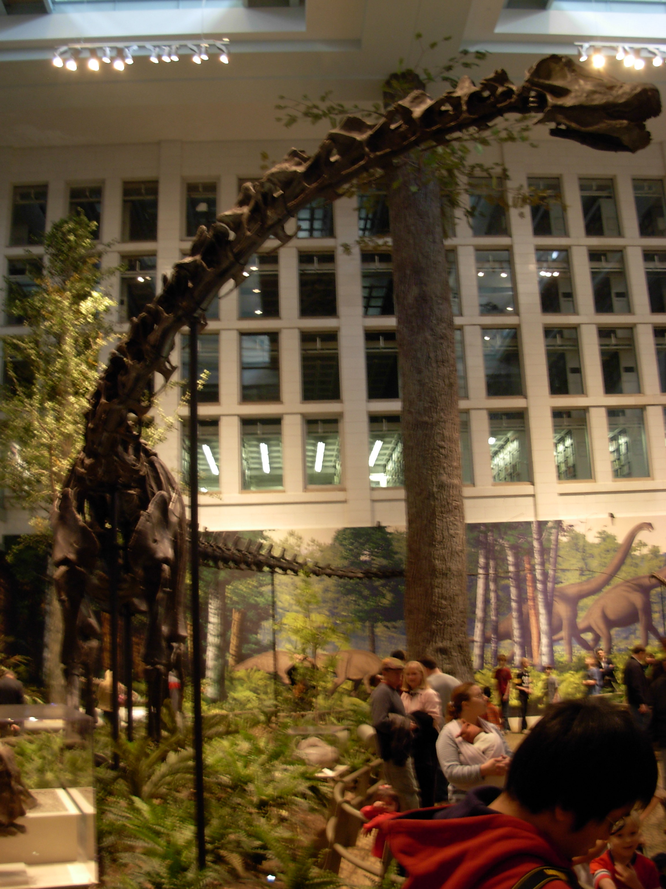 Diplodocus